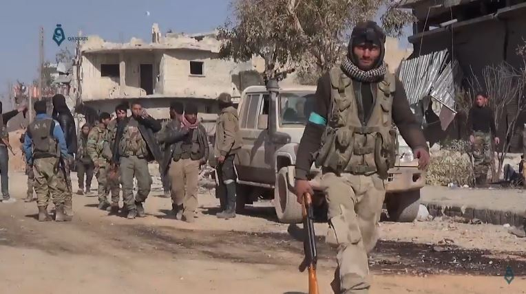 Rebelle syrien à al-Bab, 22 février 2017.